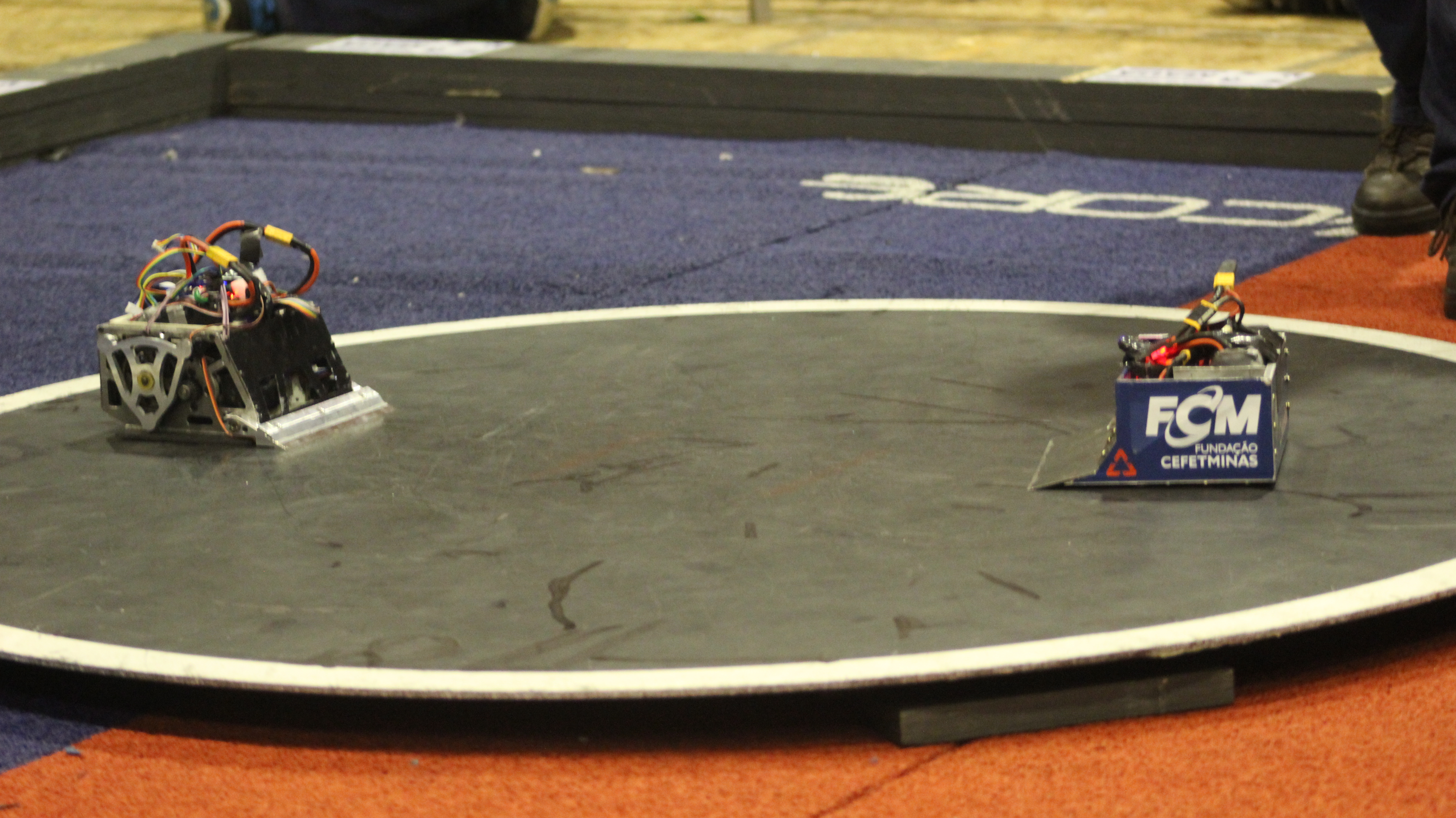 Moai (ThundeRatz)